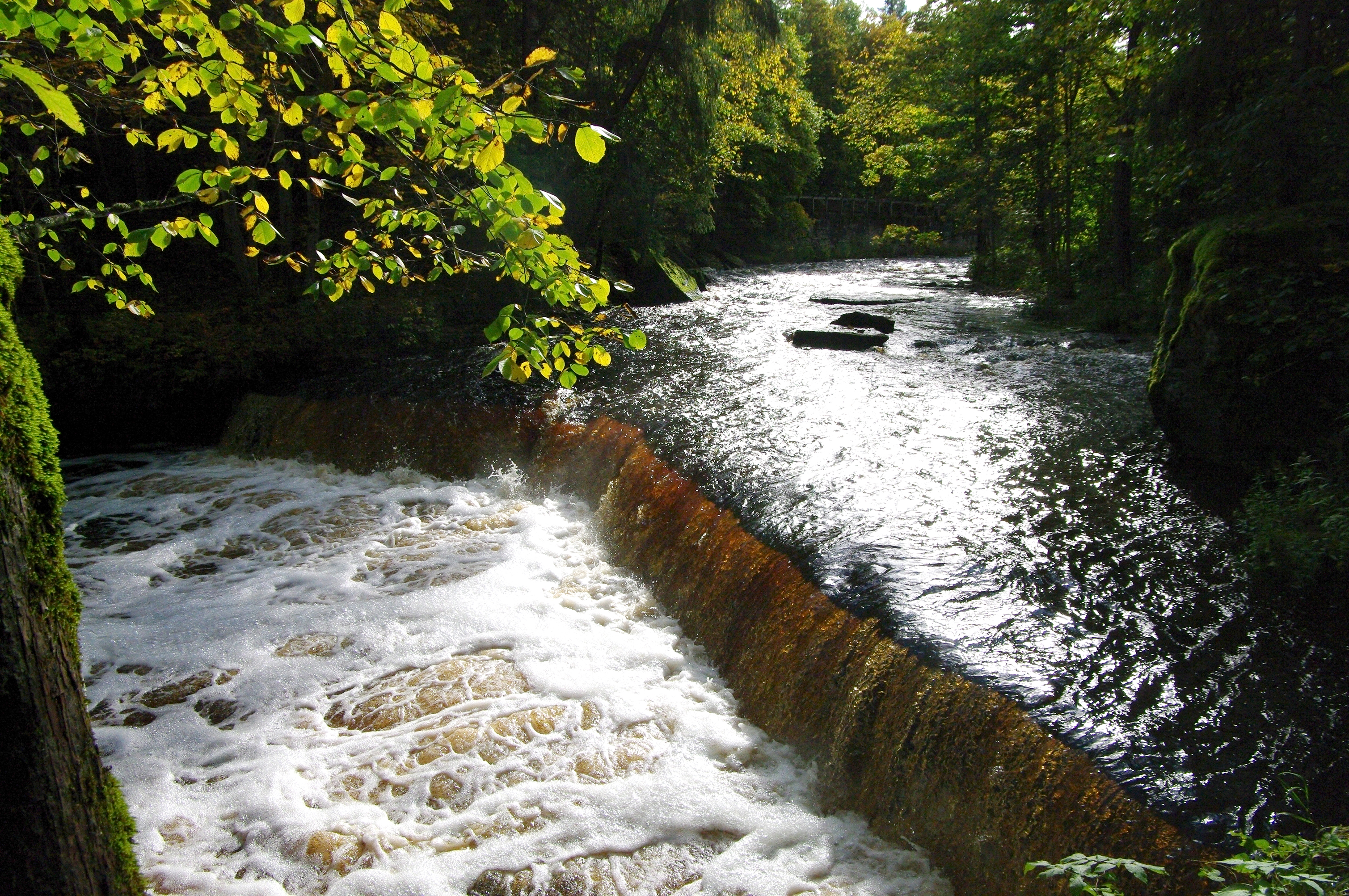 Nõmmeveski juga